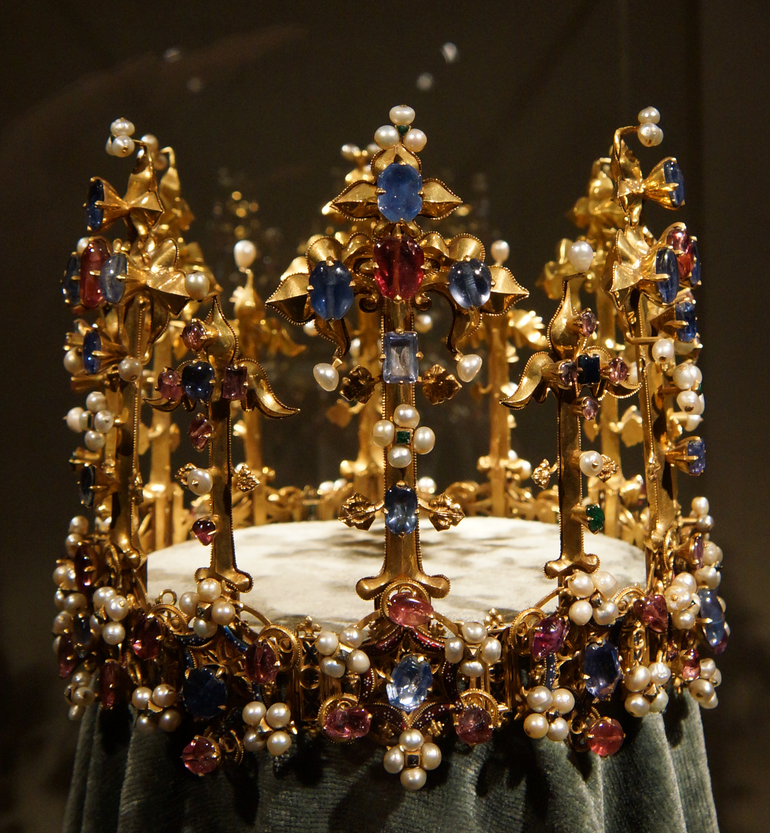 Die Schatzkammer in der Residenz (Stadtschloss) zu München